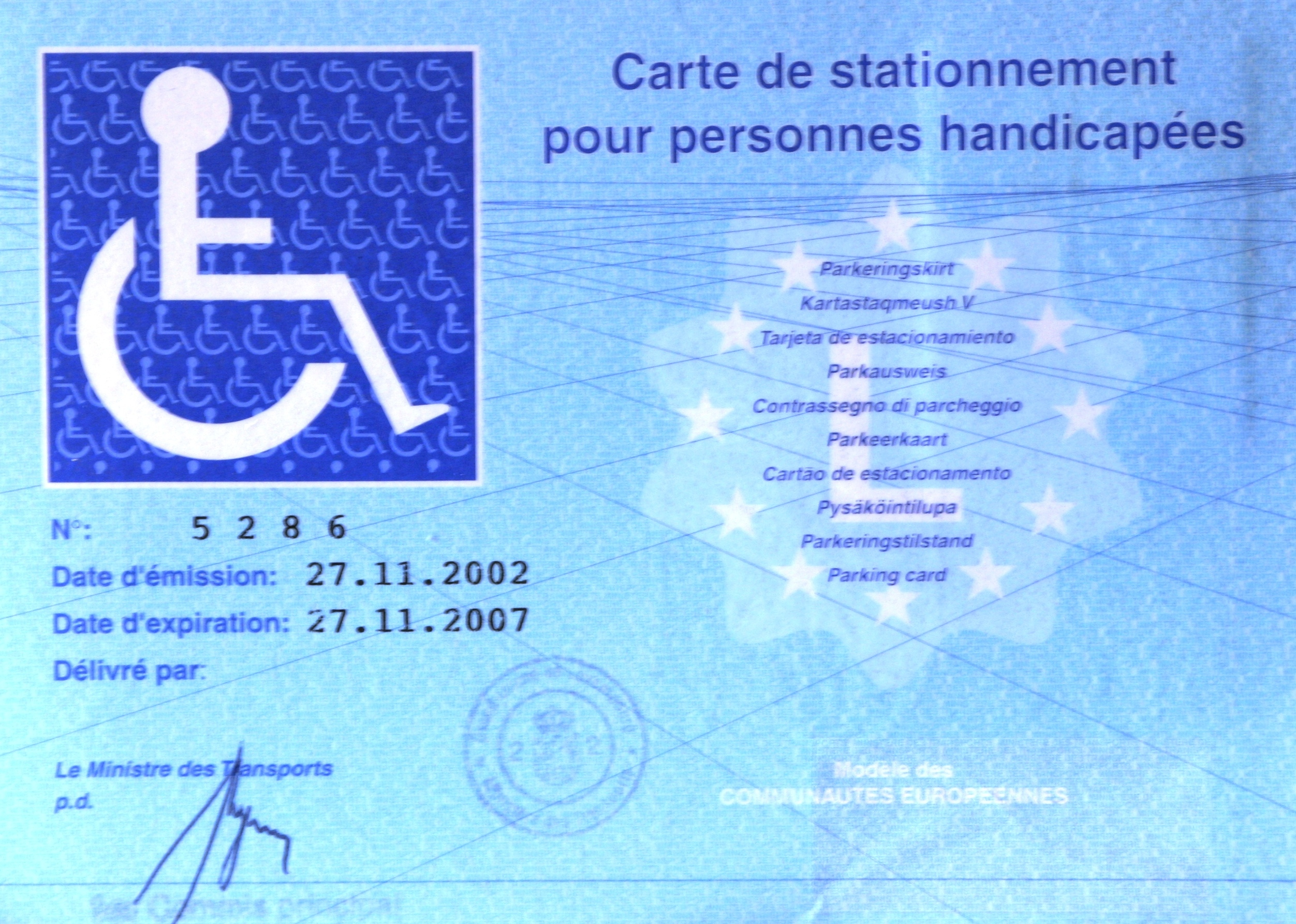 Autorisation de Stationnement.